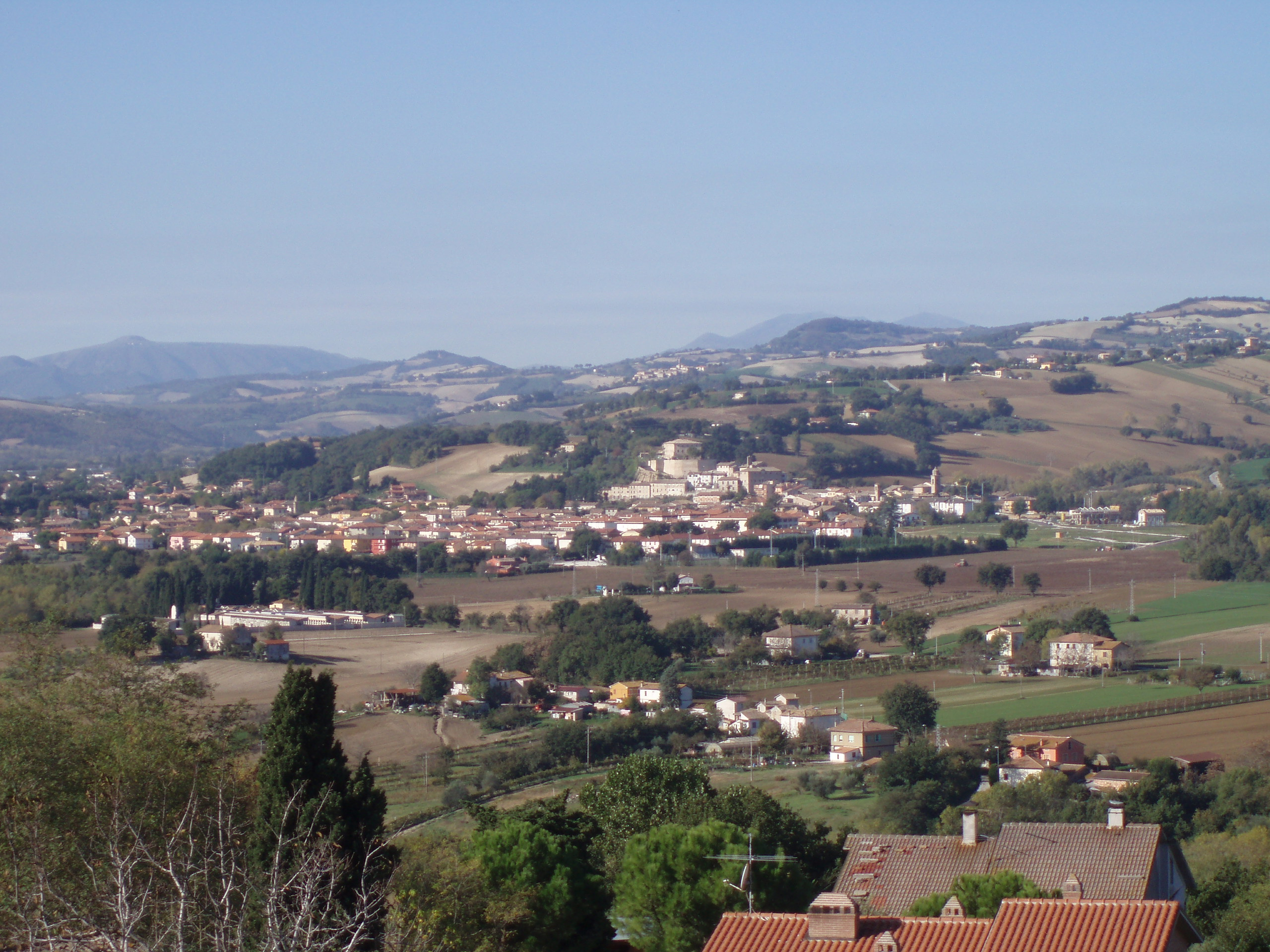 San Lorenzo in Campo - Vista dalla rocca di Castelleone di Suasa 1.JPG